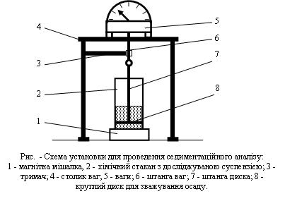 Седимент. аналіз